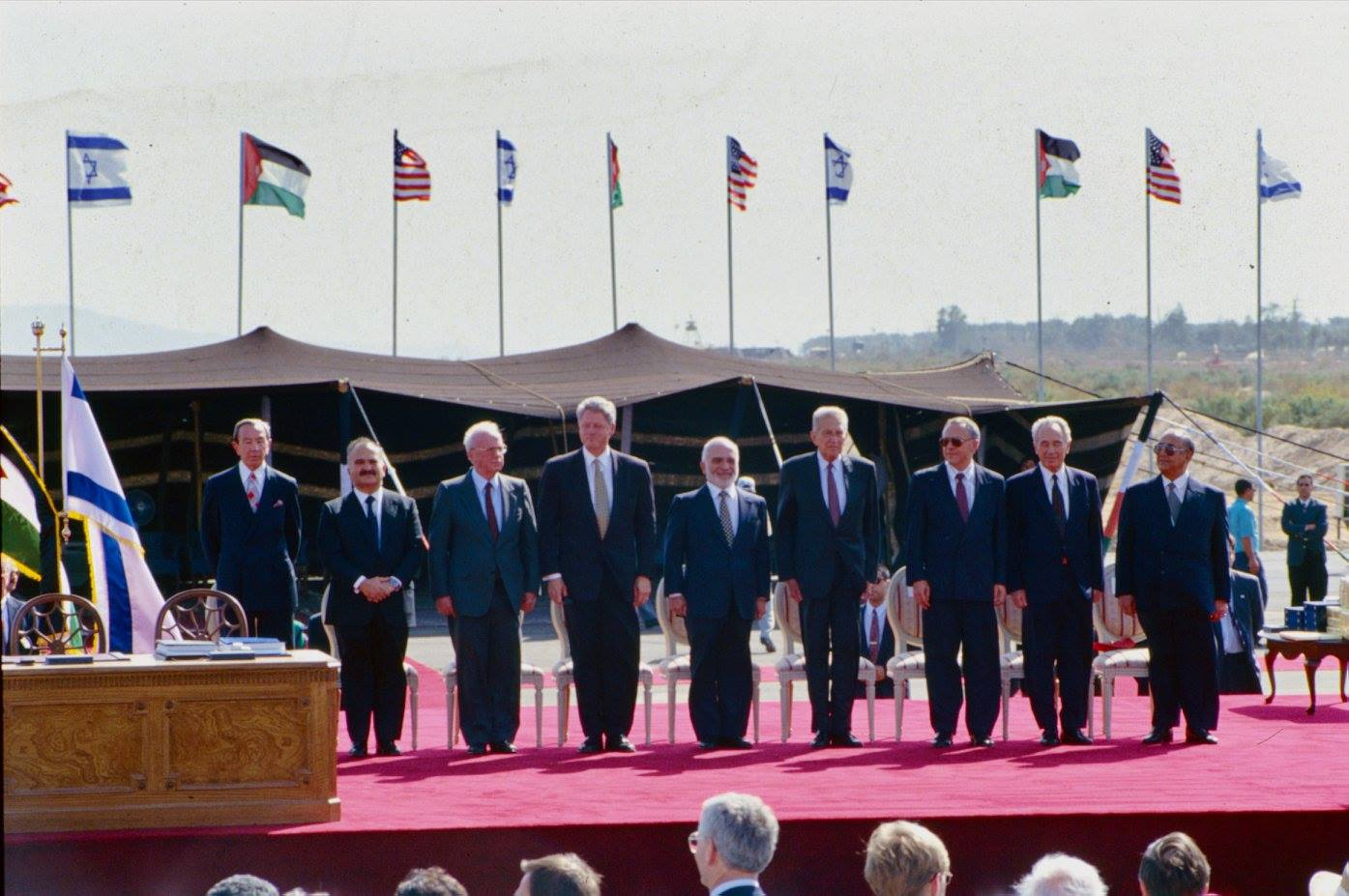 טקס חתימת הסכם השלום בין ישראל לירדן